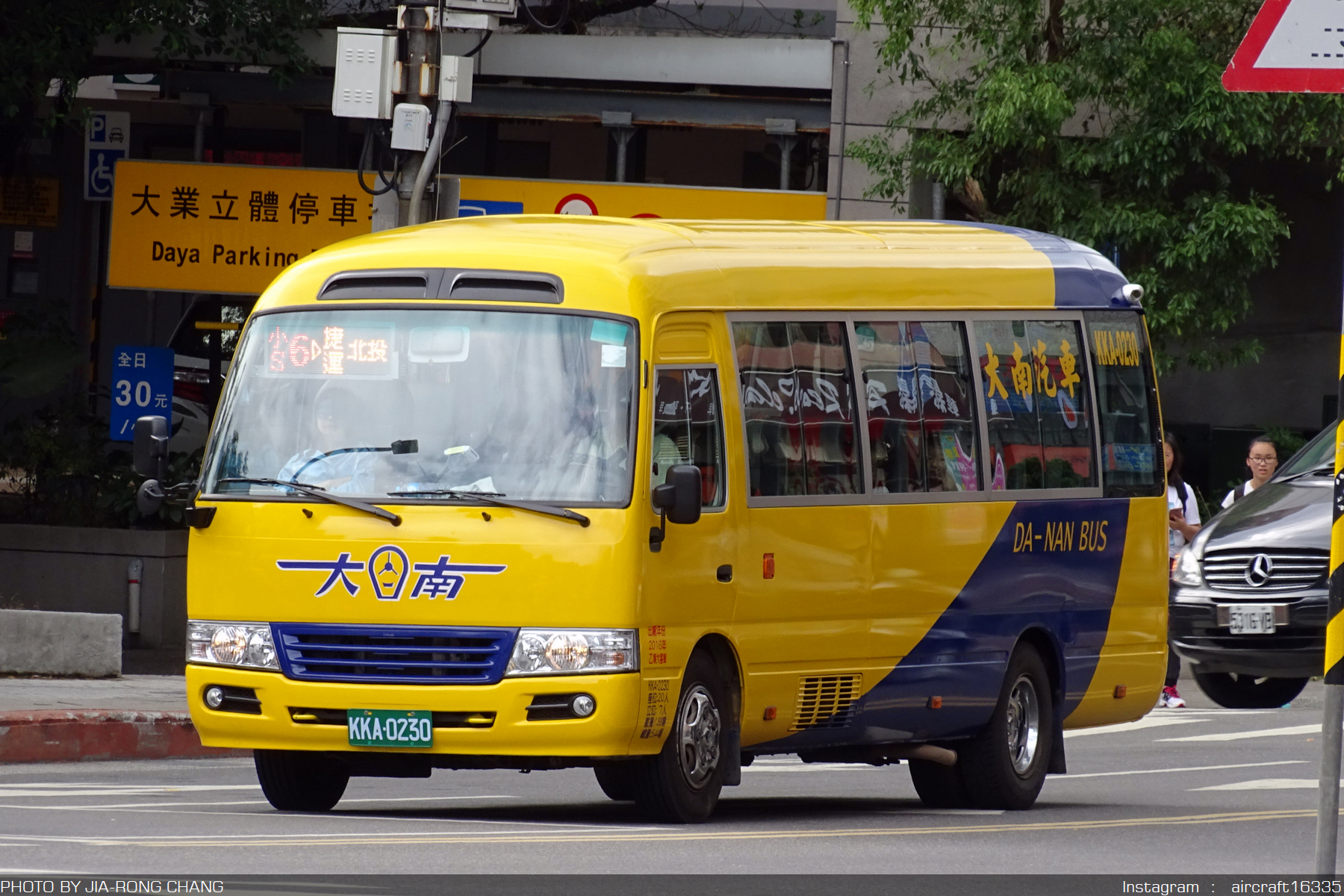 TOYOTA - XZB50L - KKA-0230